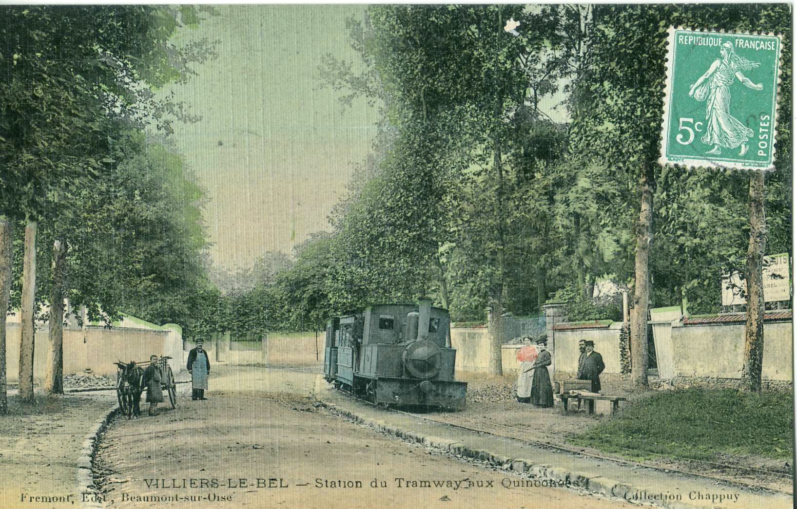 Carte postale ancienne éditée par Frémont à Beaumont-sur-Oise, collection Chappuy : VILLIERS-LE-BEL - Station du Tramway aux Quinconces